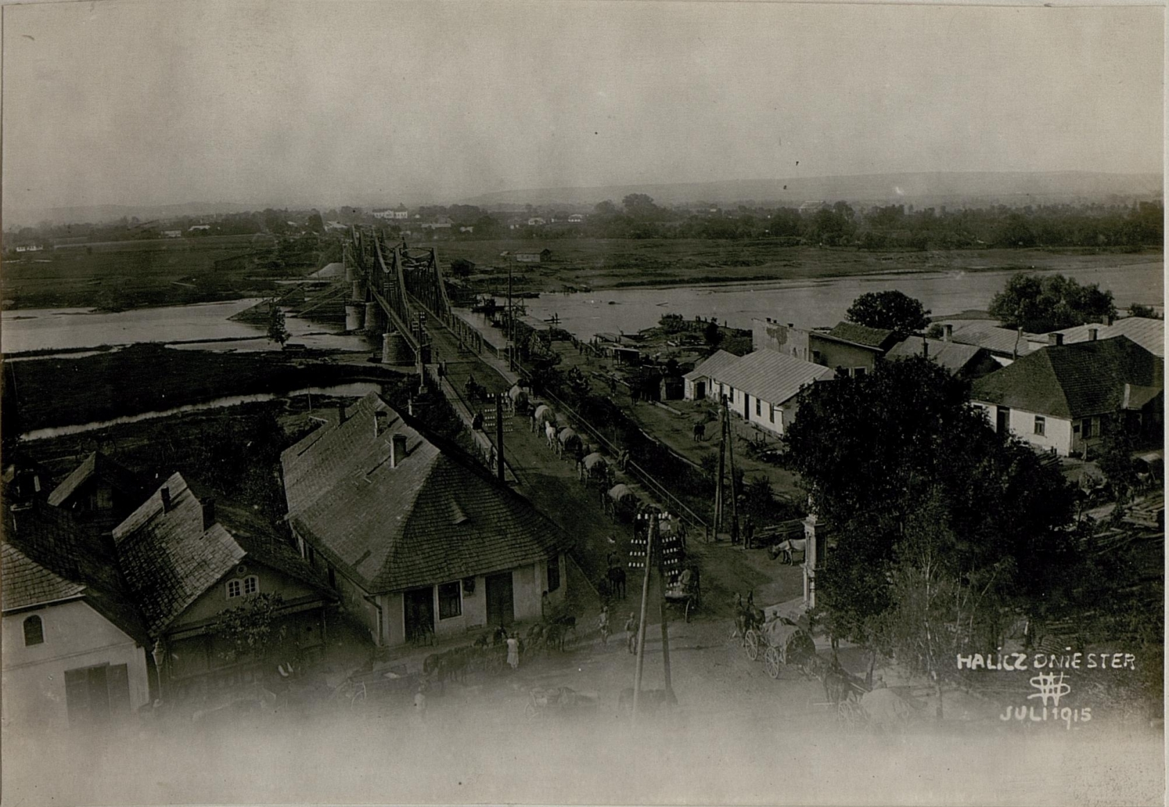 Totalansicht von Halics.